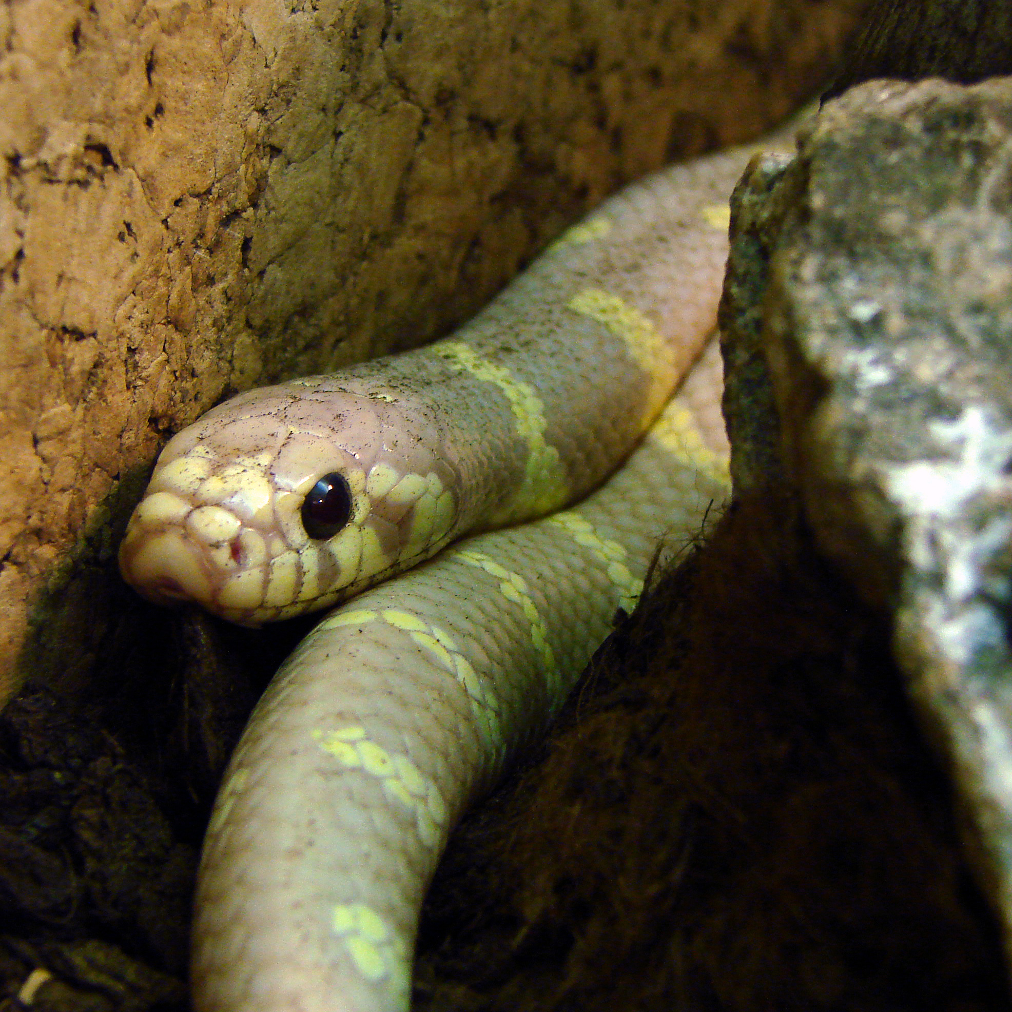 Serpent-Roi de Californie lavande ( Lampropeltis getula californiae lavander ). L'Ile aux Serpents, à La Trimouille (86).